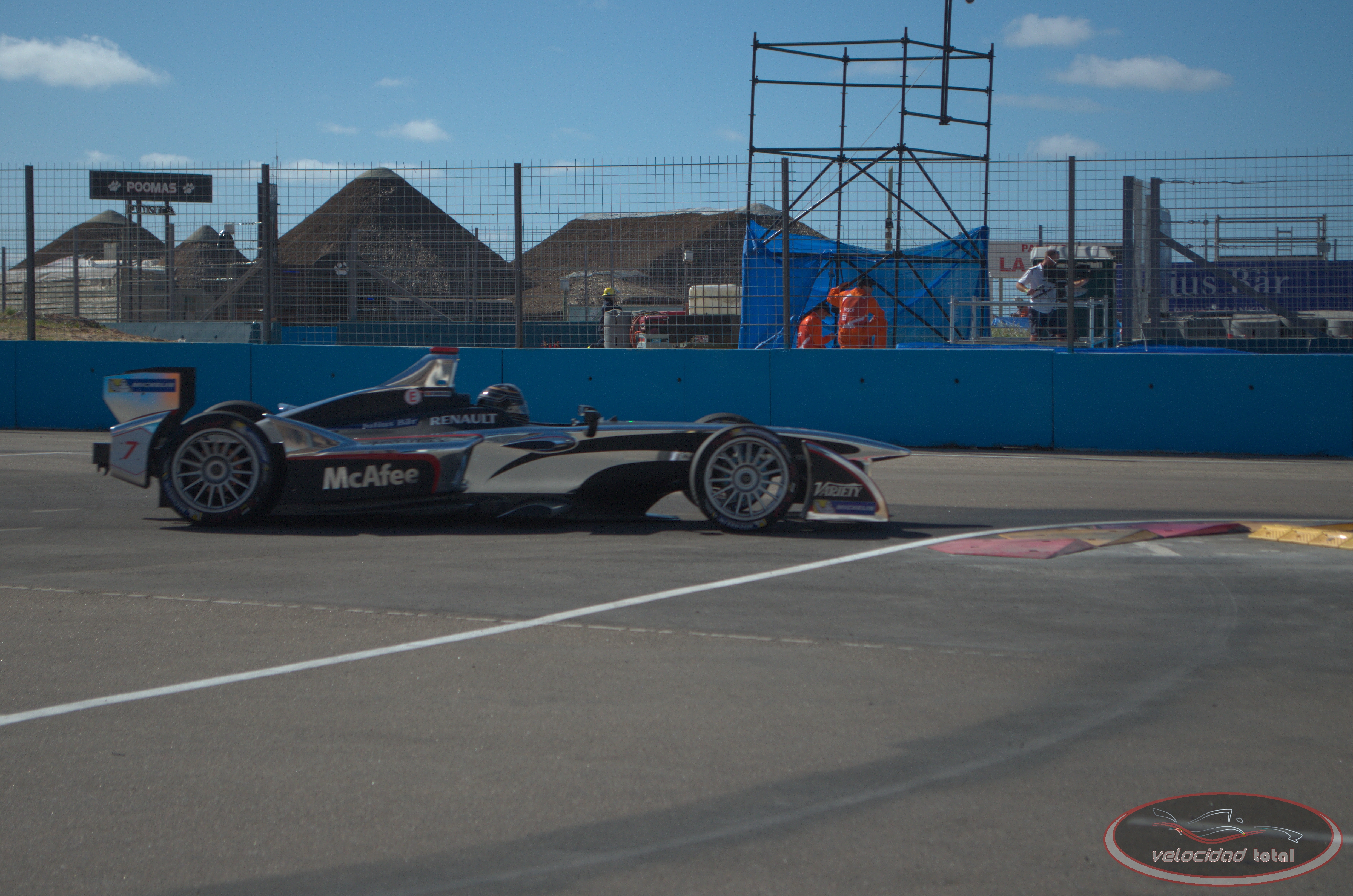 Solo se permite el uso de esta imagen mencionando a Velocidad Total como su autor. Imagen del equipo Dragon Racing de Fórmula E, durante el Punta del Este ePrix de 2014.